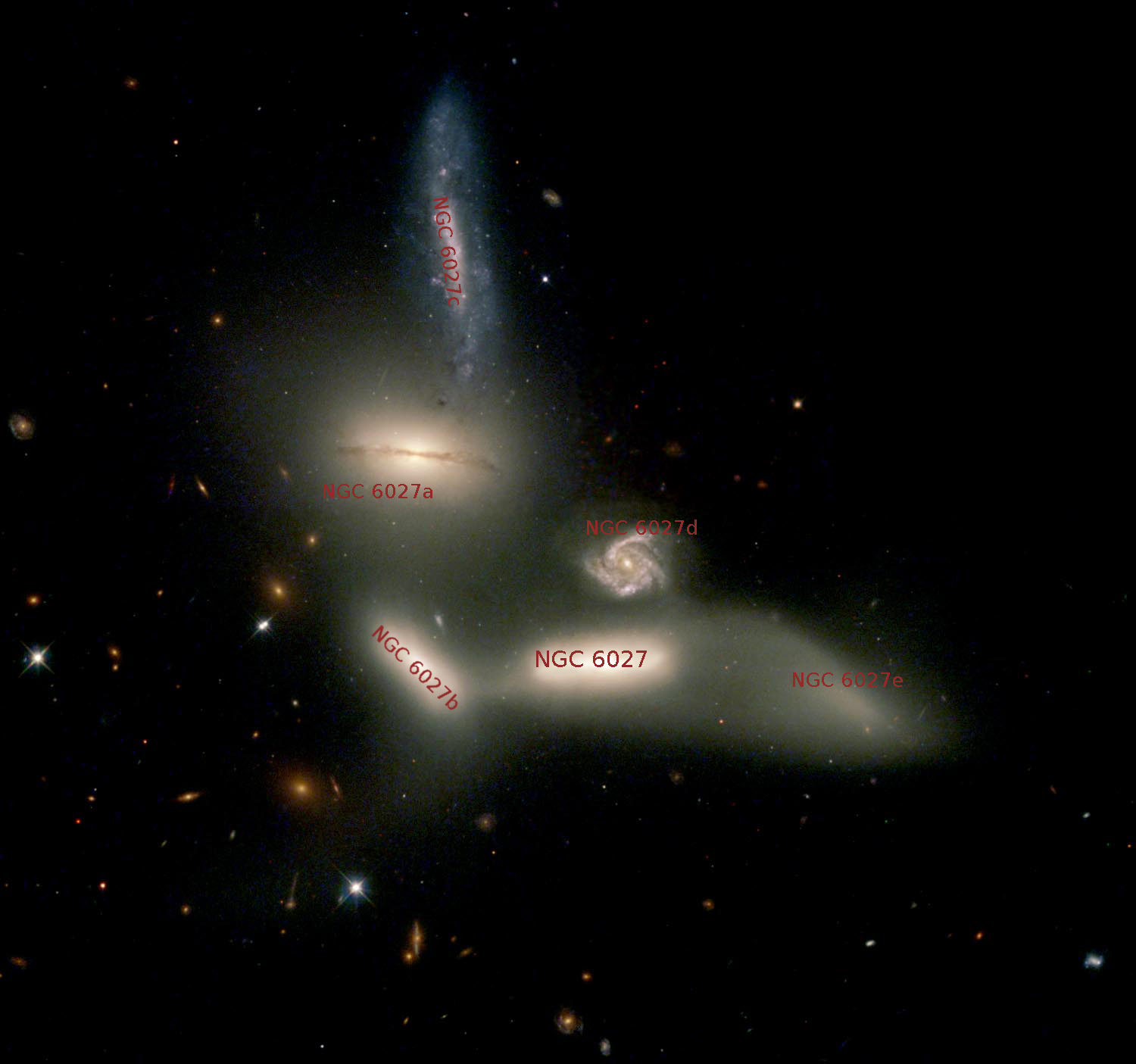 Sextet de Seyfert et ses six composantes